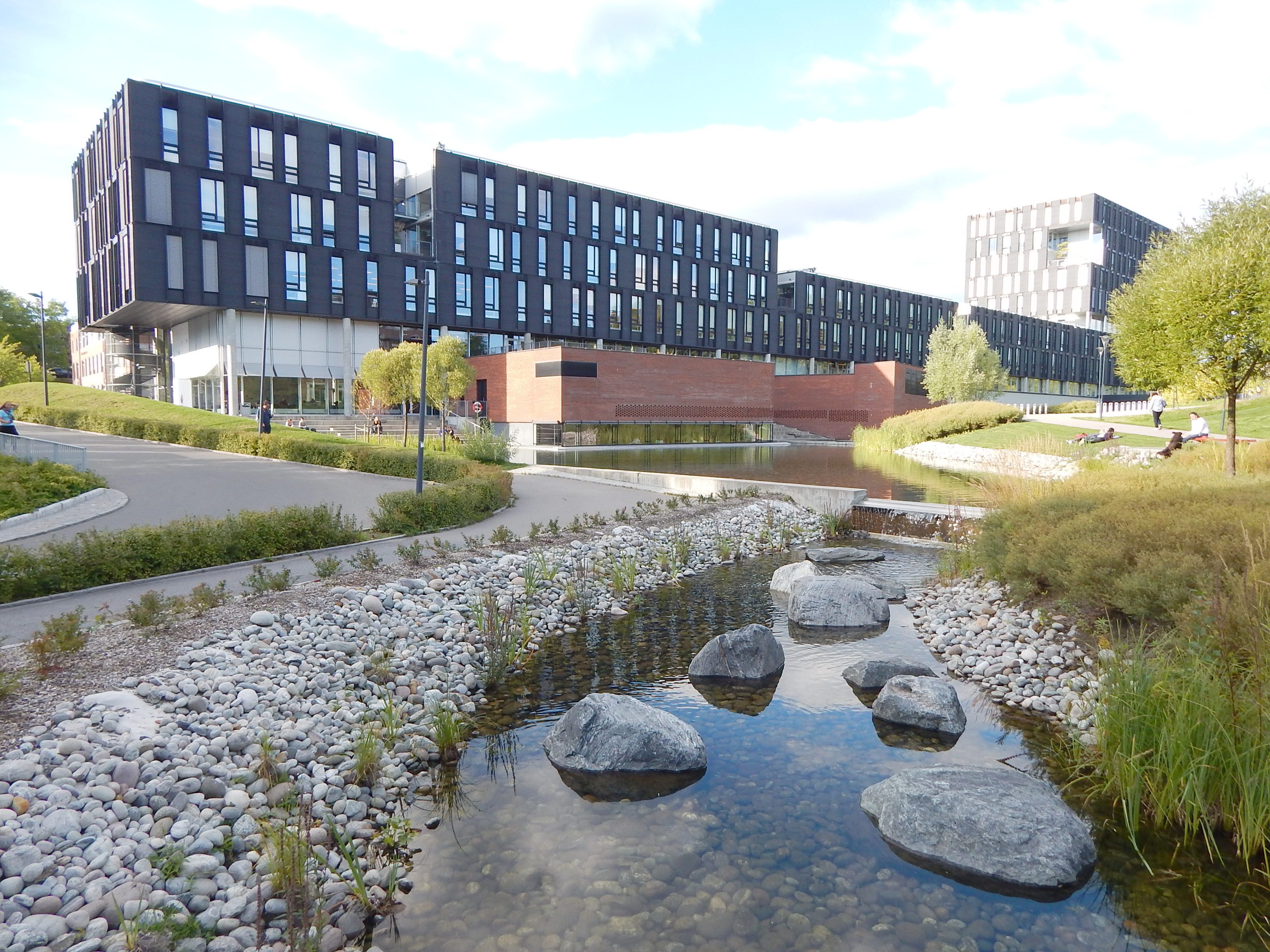 Ole-Johan Dahls hus